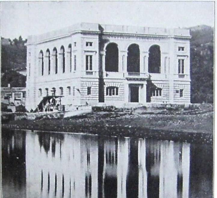 Napoli, Stazione Zoologica (poco dopo la sua fondazione). Autore sconosciuto.